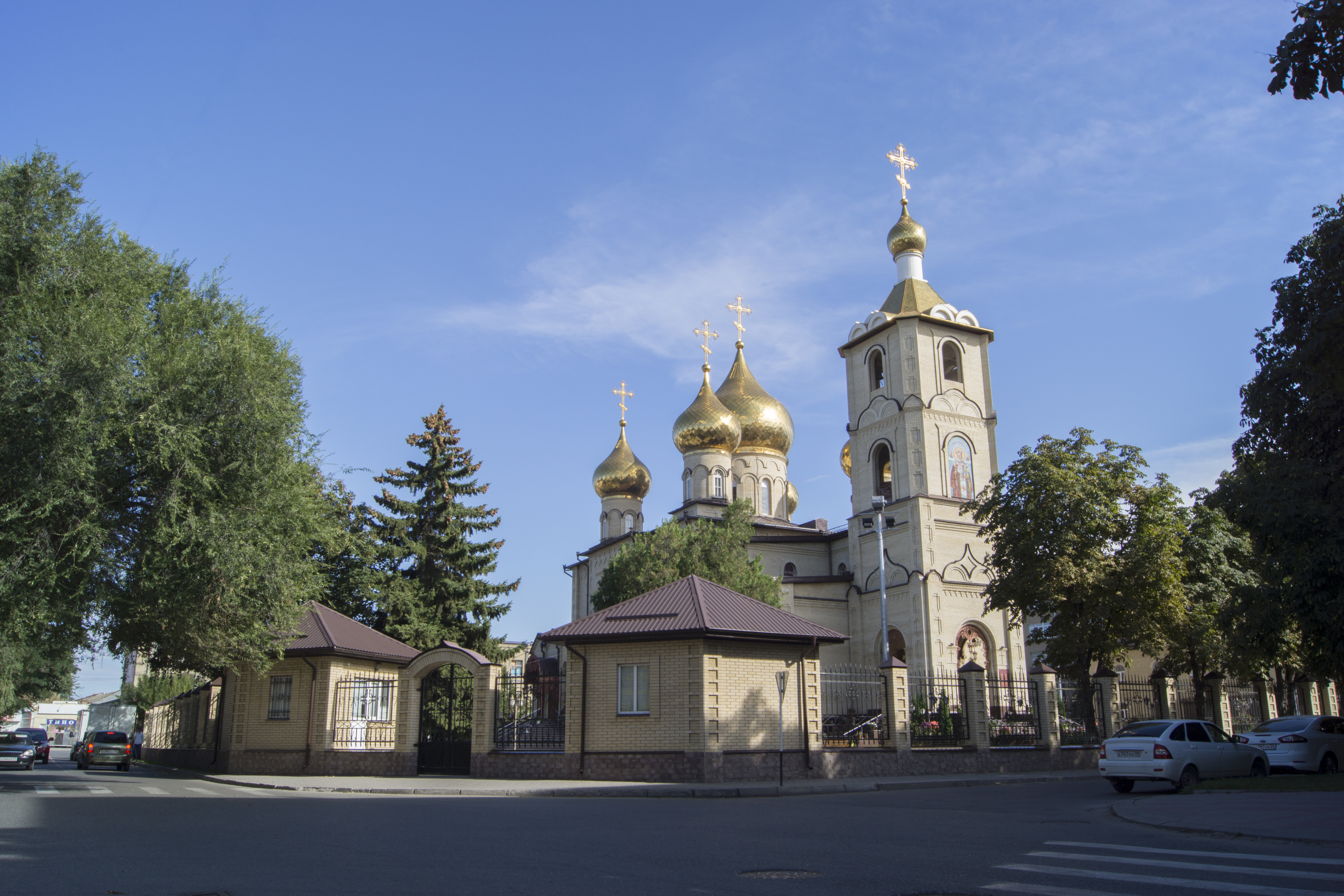 Никольский собор города Черкесска